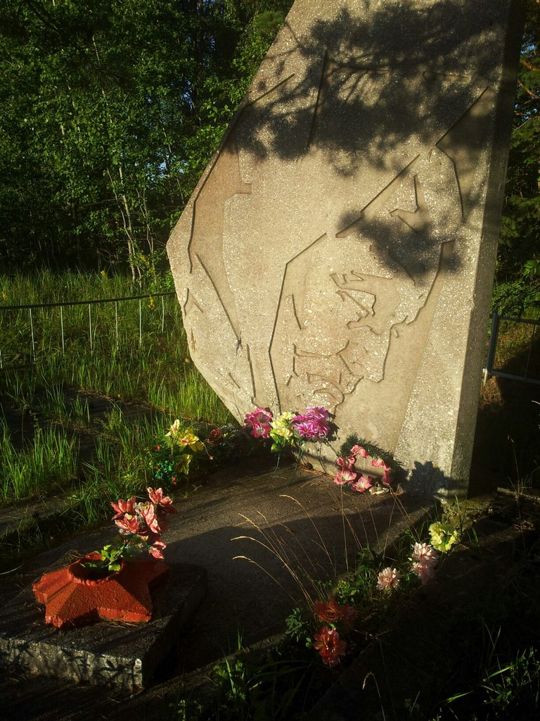 Братская могила мирных жителей, расстрелянных фашистами